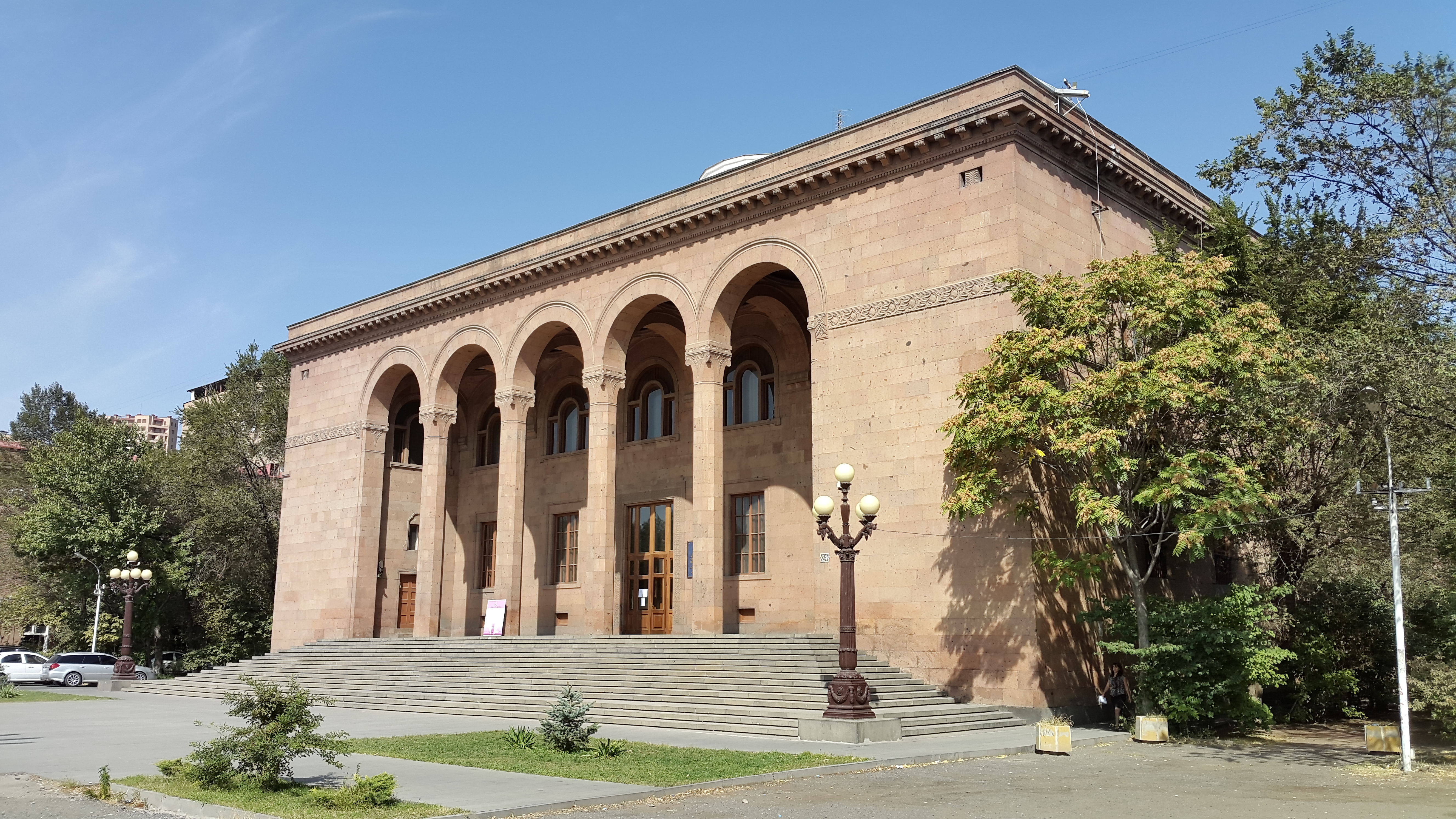 ԳԱԱ գլխավոր մասնաշենք 6/1.1